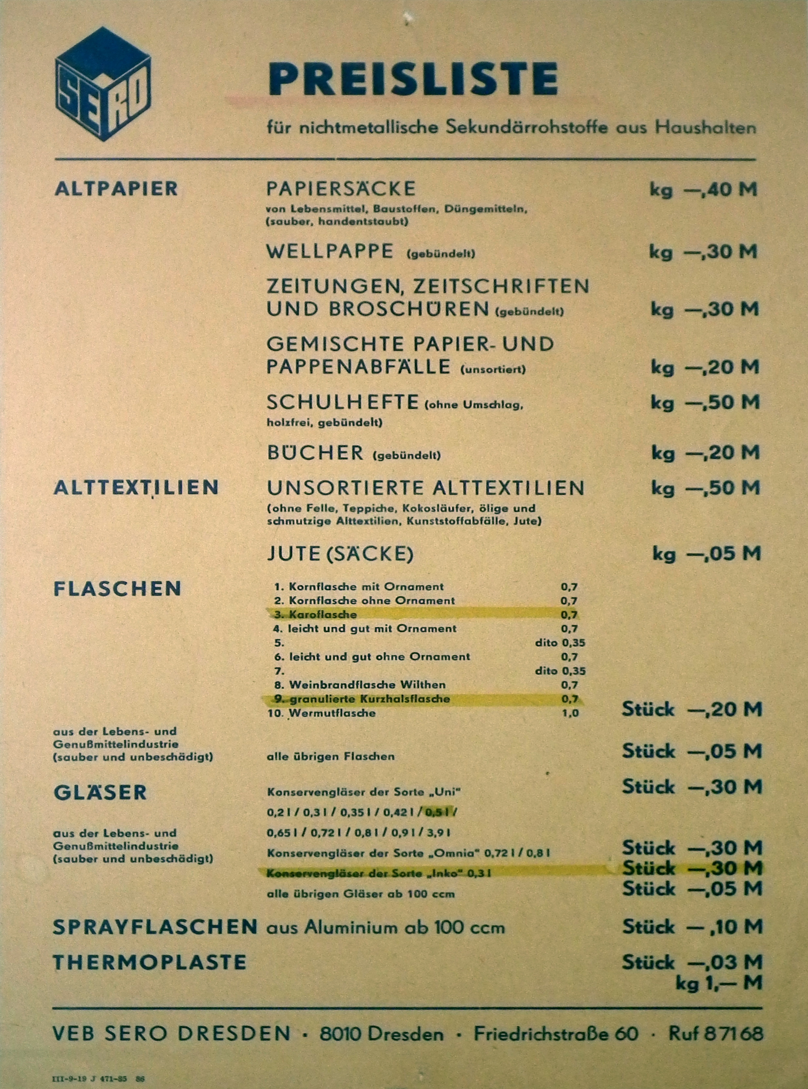 Preisliste SERO